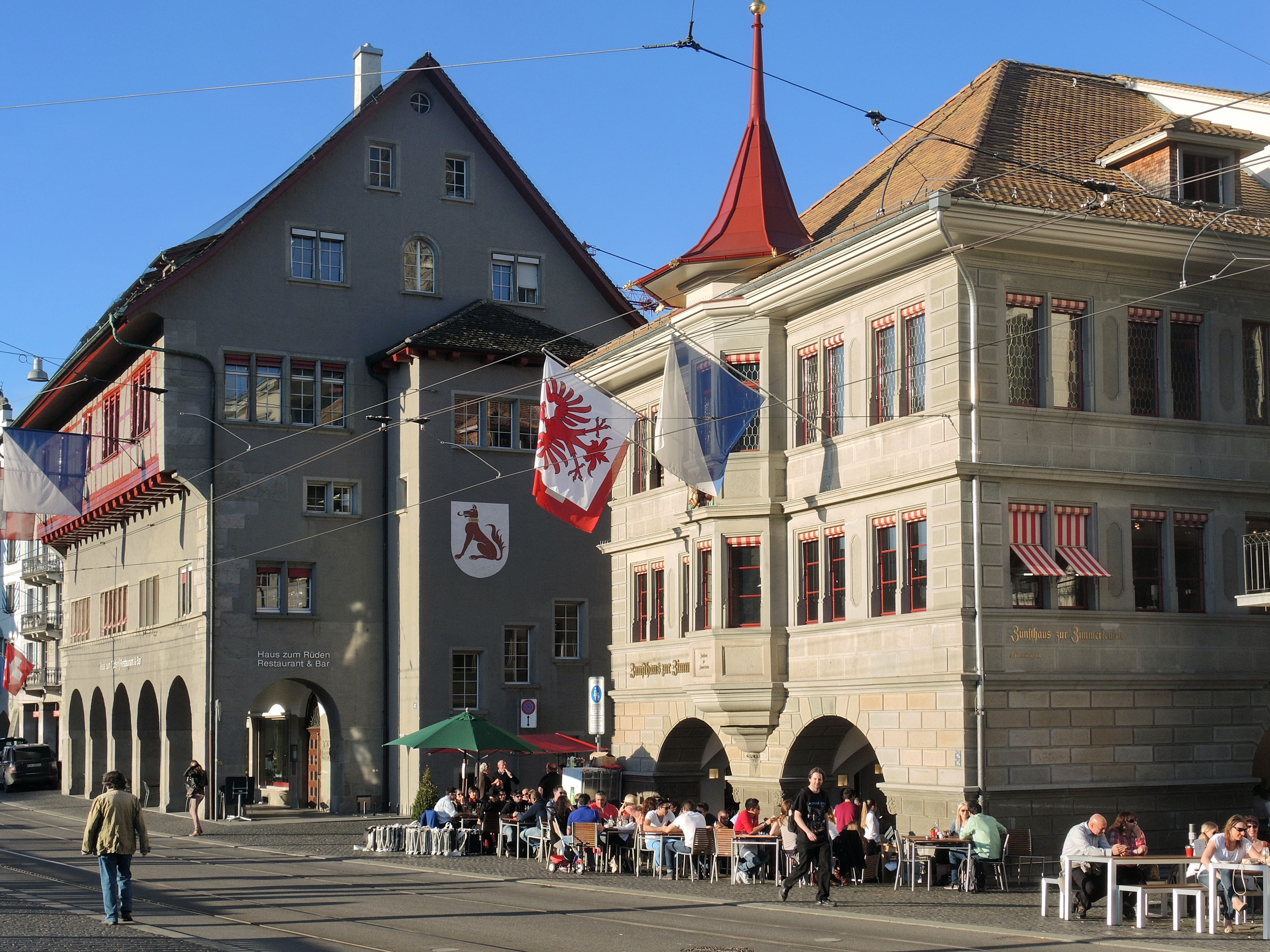 Gesellschaftshaus zum Rüden